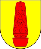 Wappen von Pfalzfeld